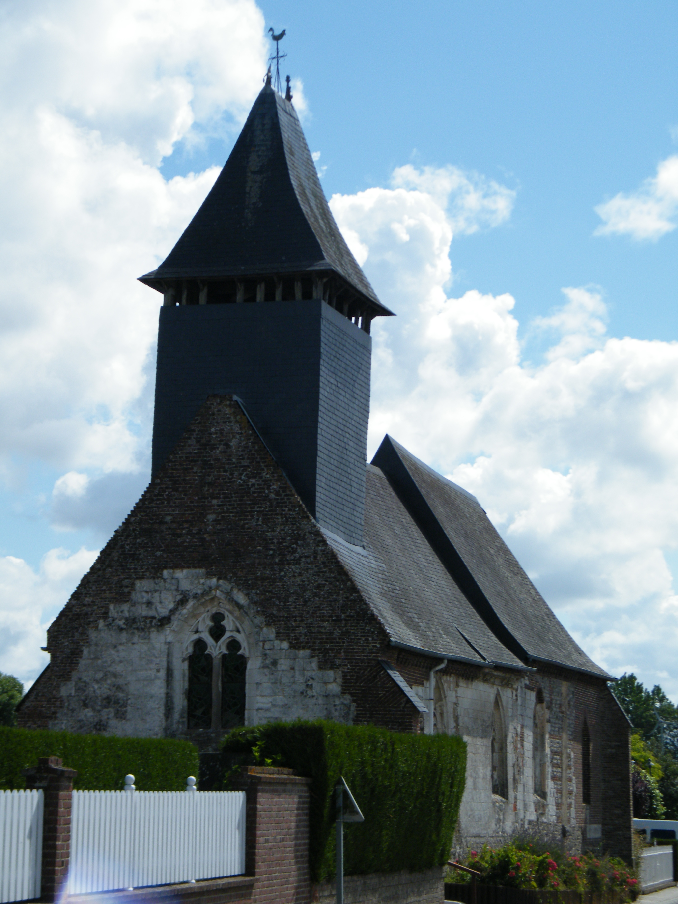 Intraville, Seine-Maritime, France, église